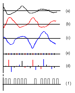 Este diagrama ha sido dibujado por PACO Formas de onda en distintos puntos de un sistema de Modulación por Impulsos Codificados (MIC)